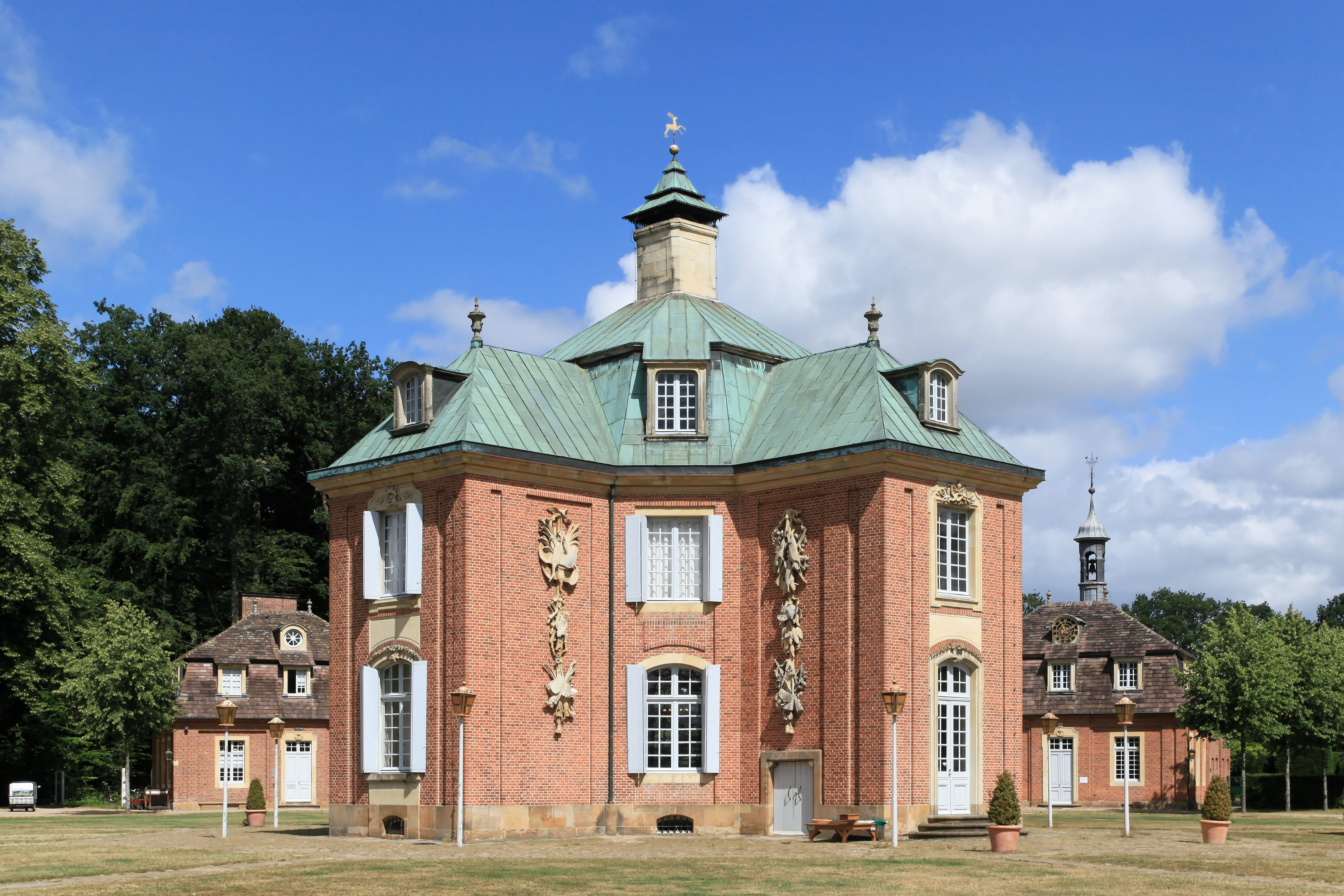 Zentralpavillon von Schloss Clemenswerth, Clemenswerth in Sögel